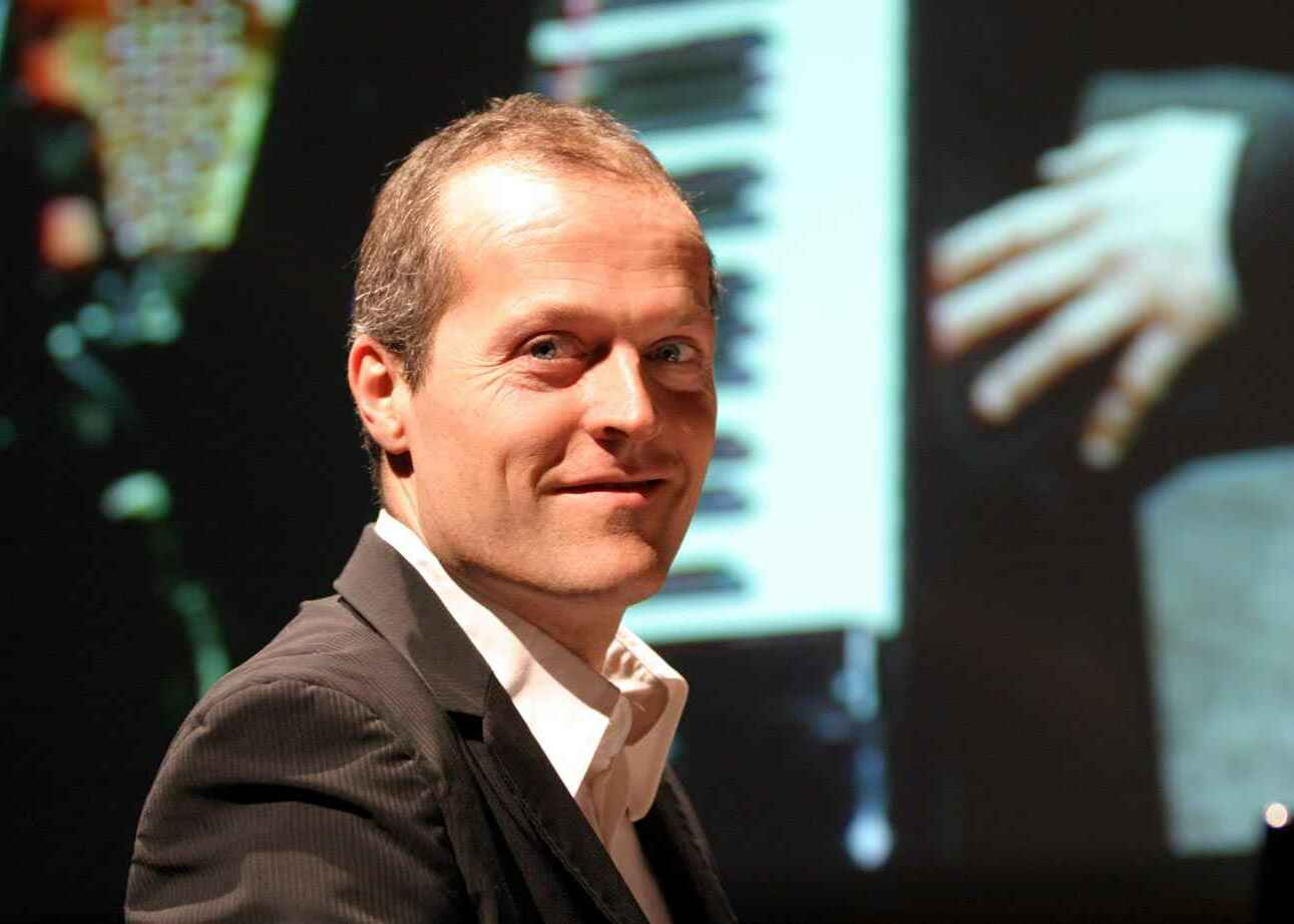 Joja Wendt